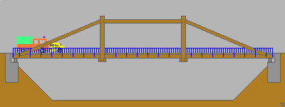 Hängesprengwerk